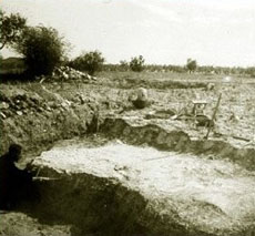 El arqueólogo Joaquín Sánchez Jiménez, durante la excavación de El Llano de la Consolación a comienzos de siglo.